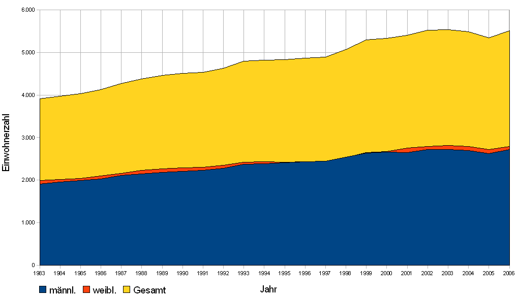 Einwohnerzahlentwicklung von Ebersheim